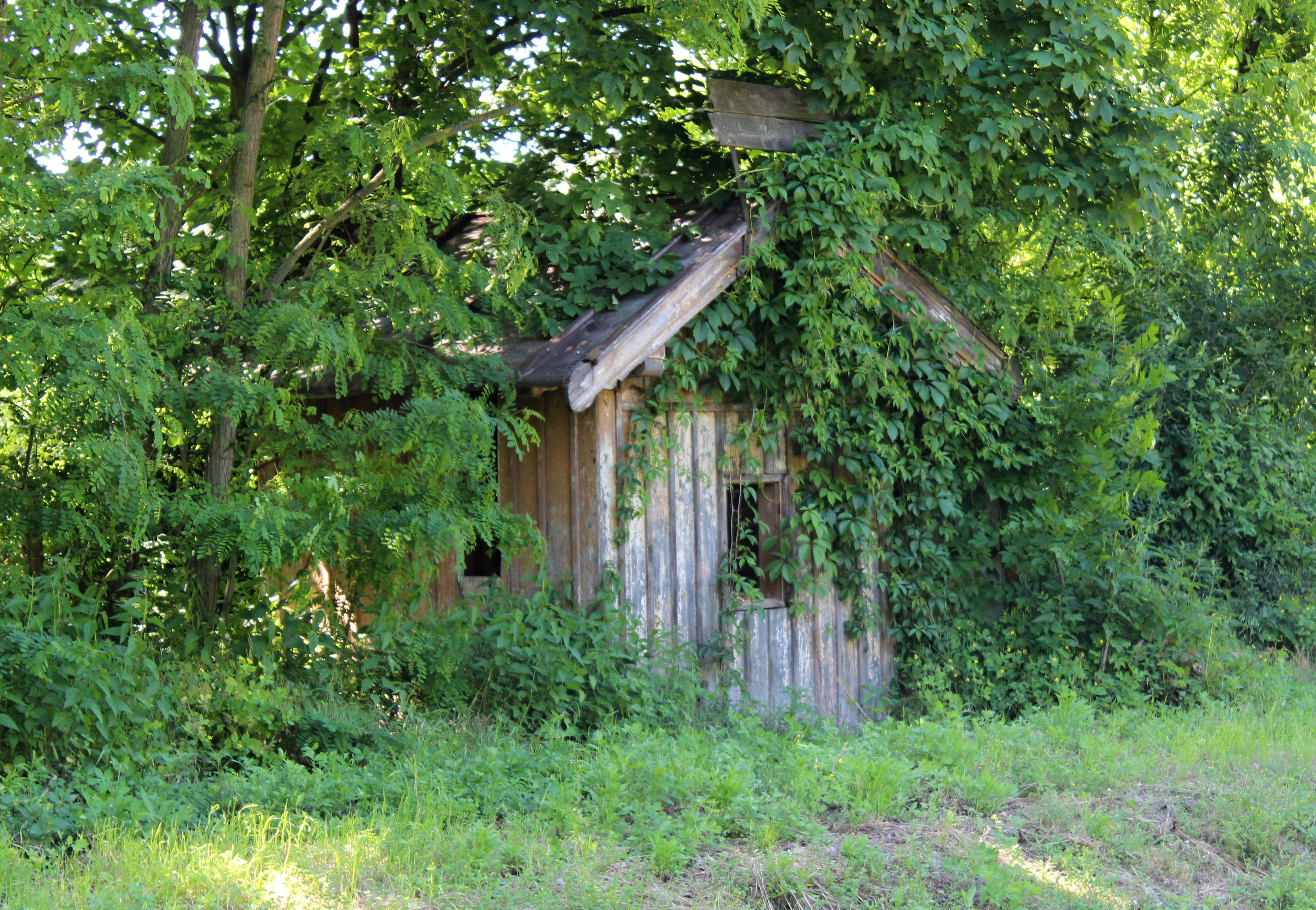 Libřice dřevěná pokladna